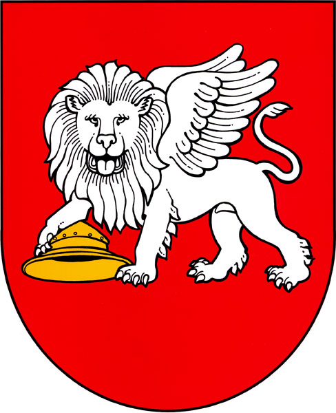 Znak obce Třibřichy